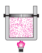 Ջերմաքանակ